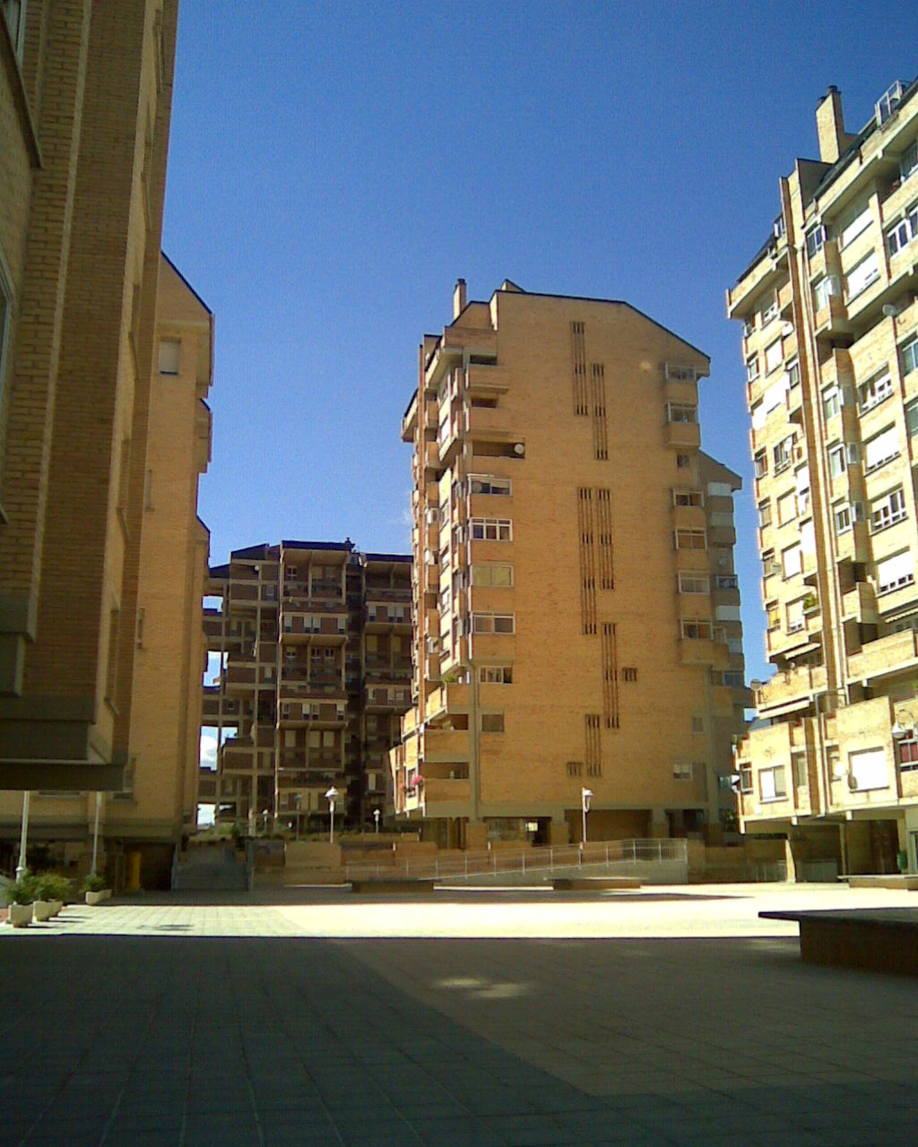 Zizur Nagusiko etxe zaharrenen ingurua.